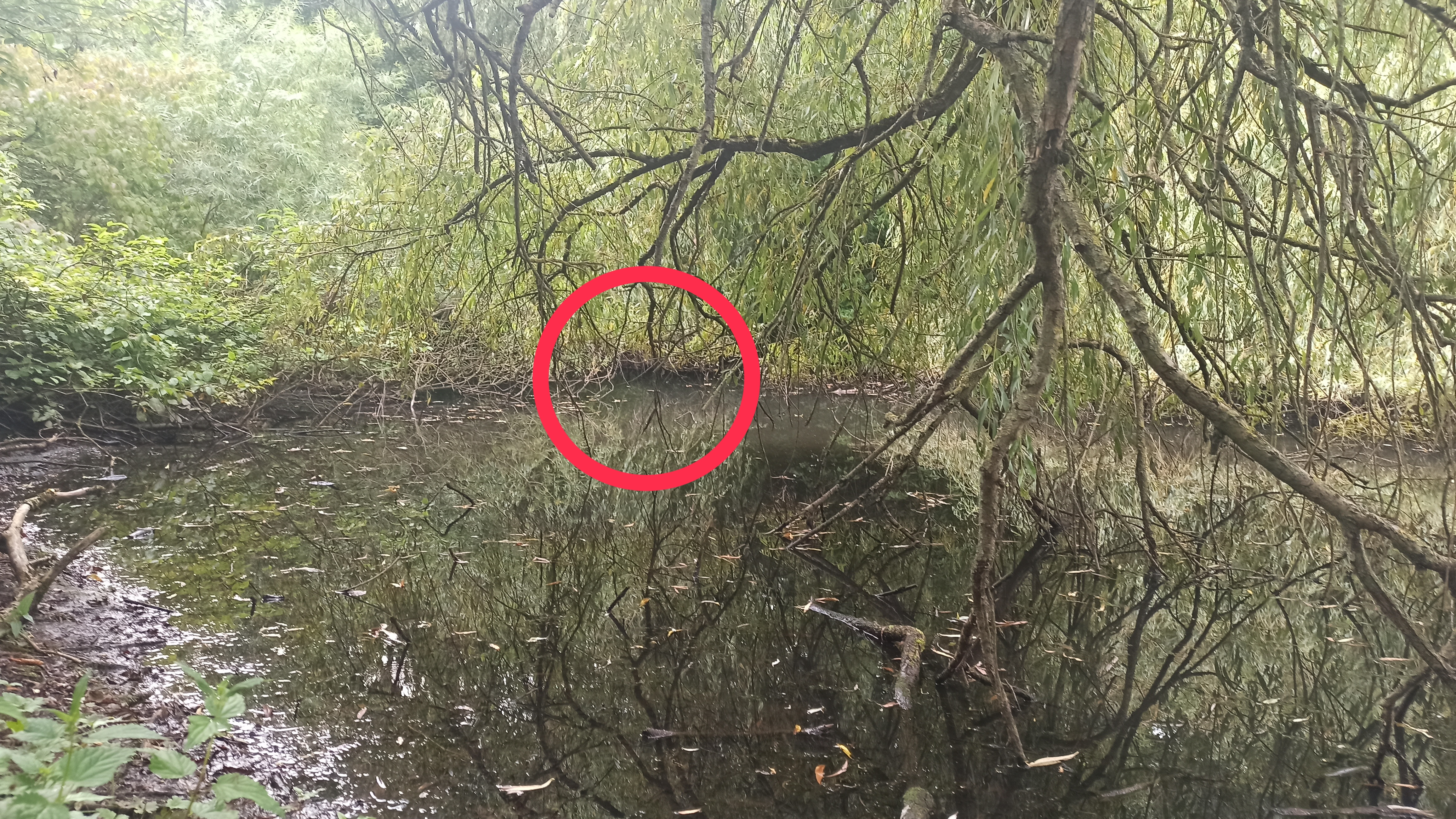 Dübwischgraben Mündung (markiert) am Westufer des Kollauteichs